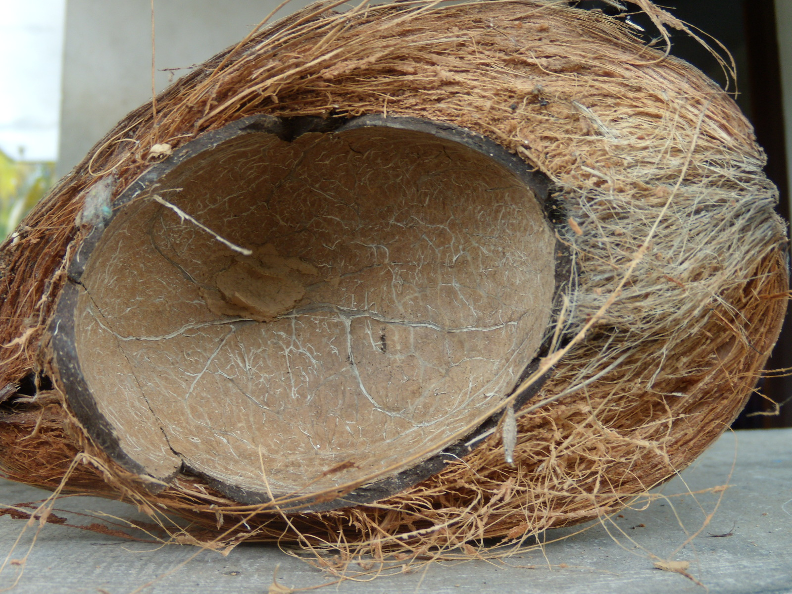 ചിരട്ടയും ചകിരിയും